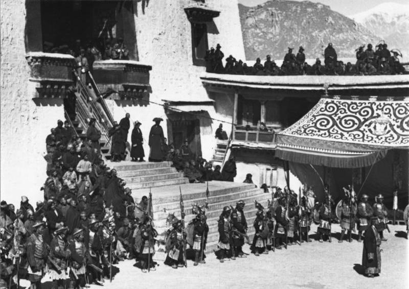 Lhasa, Kriegs-, Teufels- und Lamatänze anlässlich des heranrückenden Neujahrsfestes im Hofe des Potala